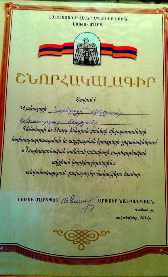 Ձեռք մեկնիրի շնորհակալագիր